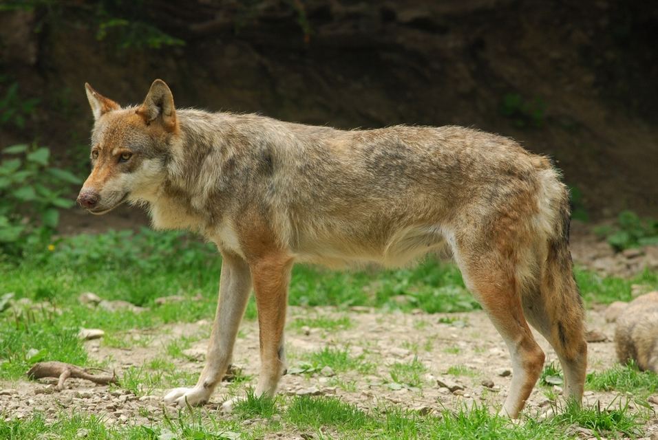 BOREON (06): ALPHA " Le temps du loup"